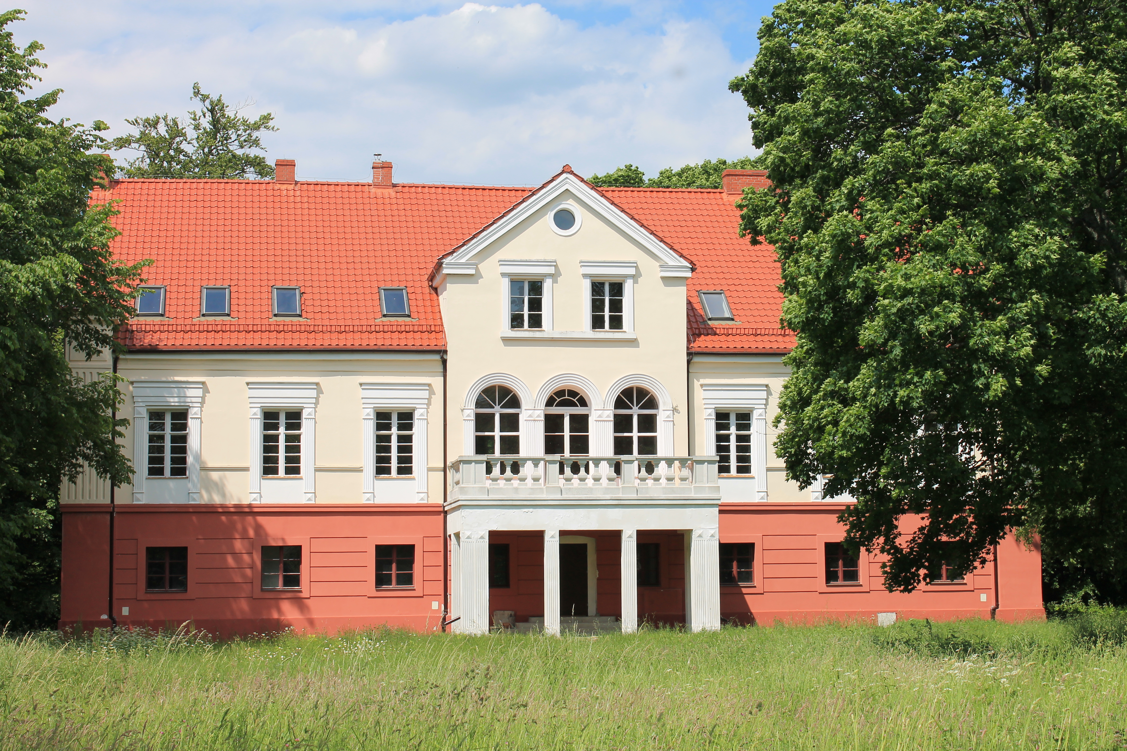 Pałac, 1 poł. XIX w Cybulinie, powiat koszaliński